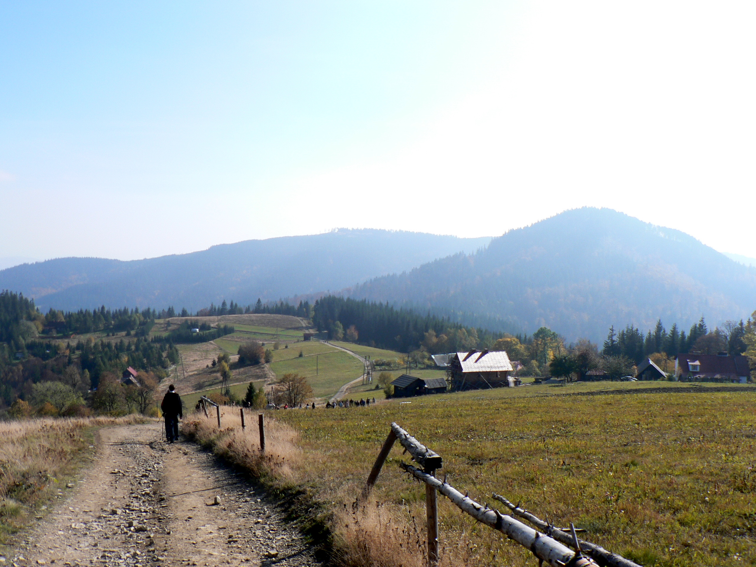 Stożek Wielki ze zboczy Cieślara